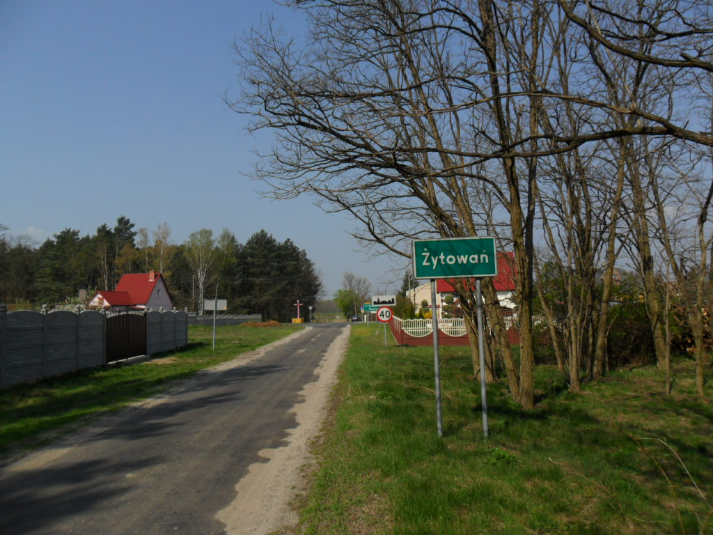 Żytowań